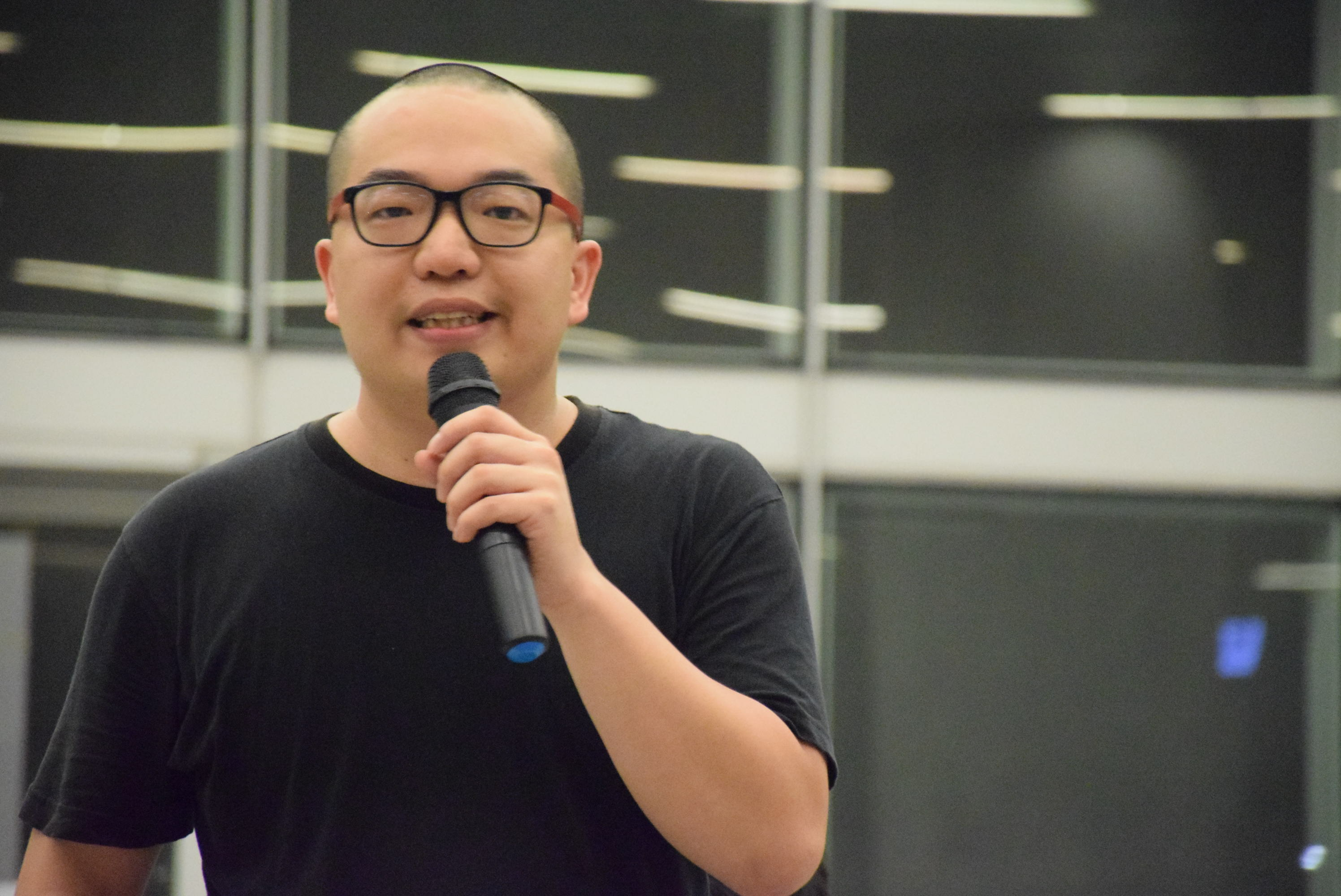 香港時事評論員陳景輝。